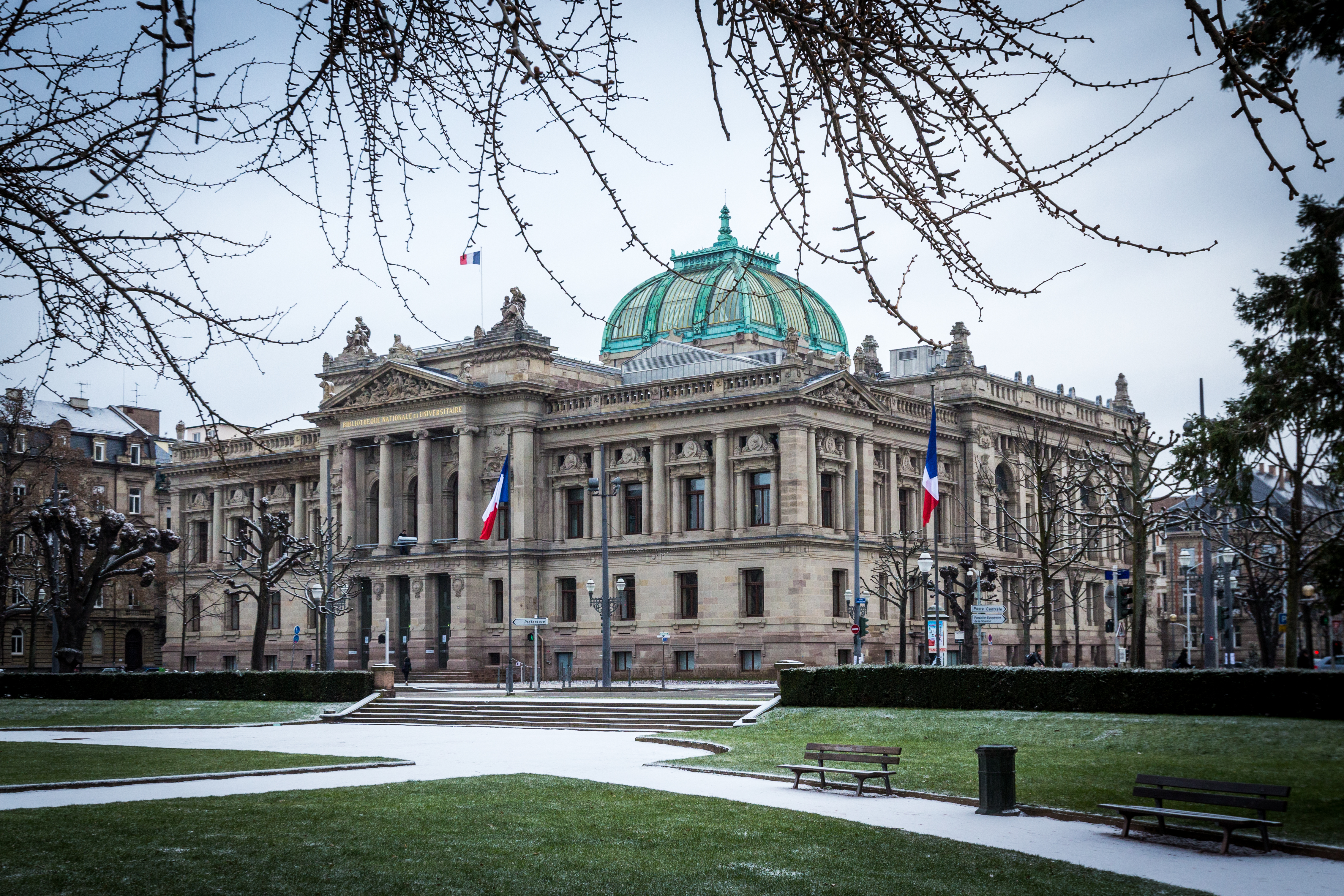 Strasbourg place de la République BNUS